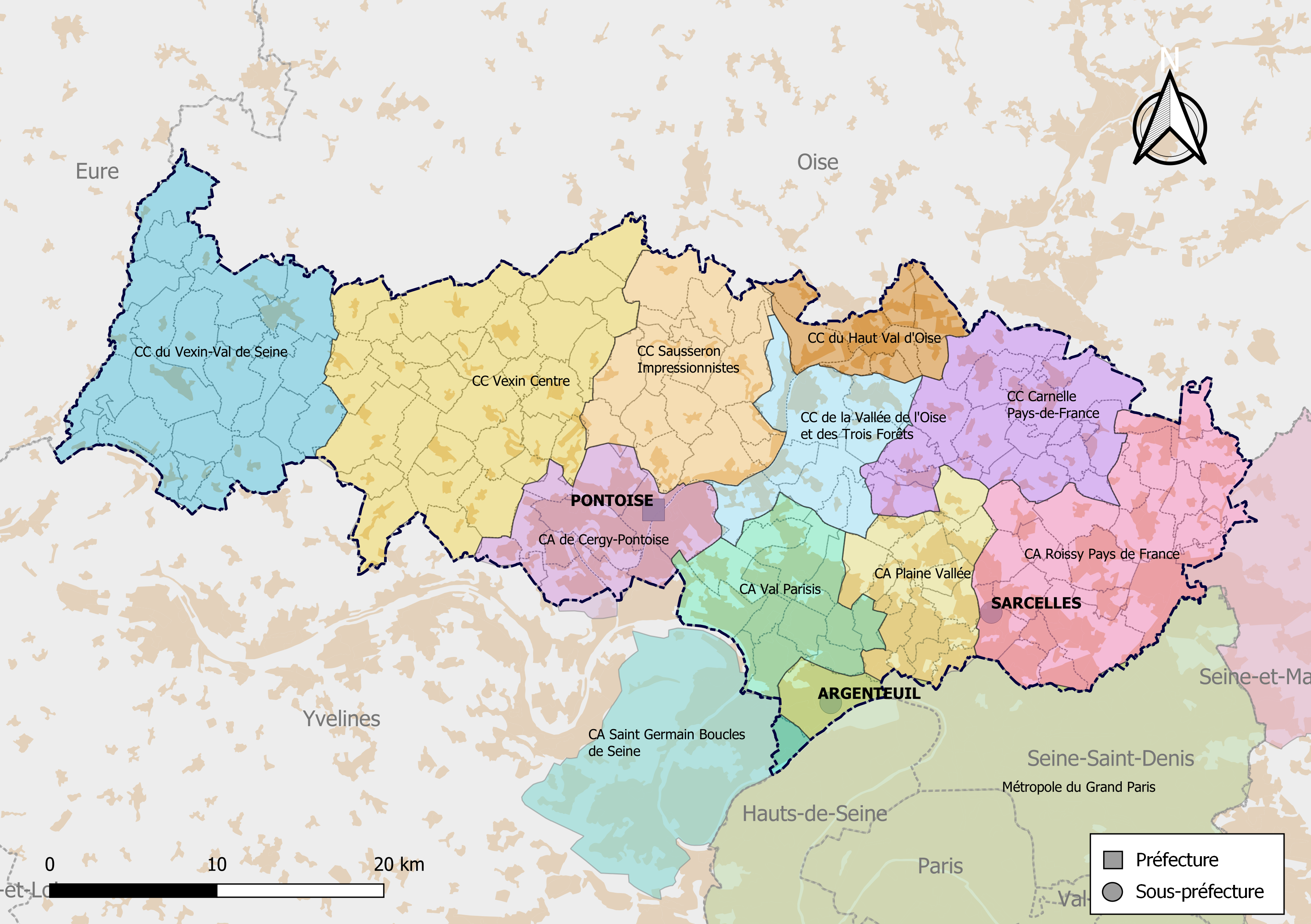 Carte des intercommunalités du département du Val-ded'Oise, France. Composition au 1er janvier 2019.